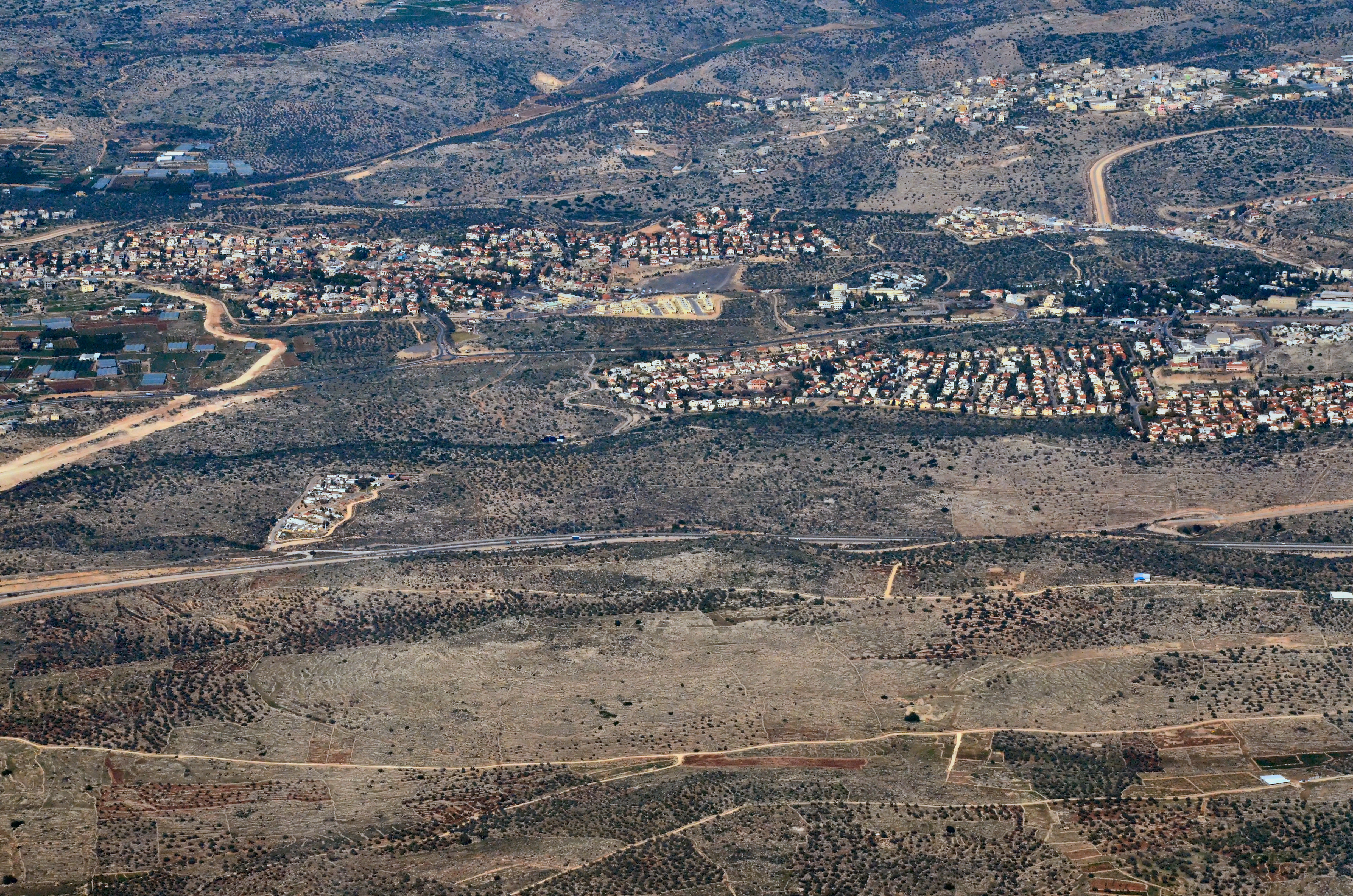 אלקנה ושערי תקוה